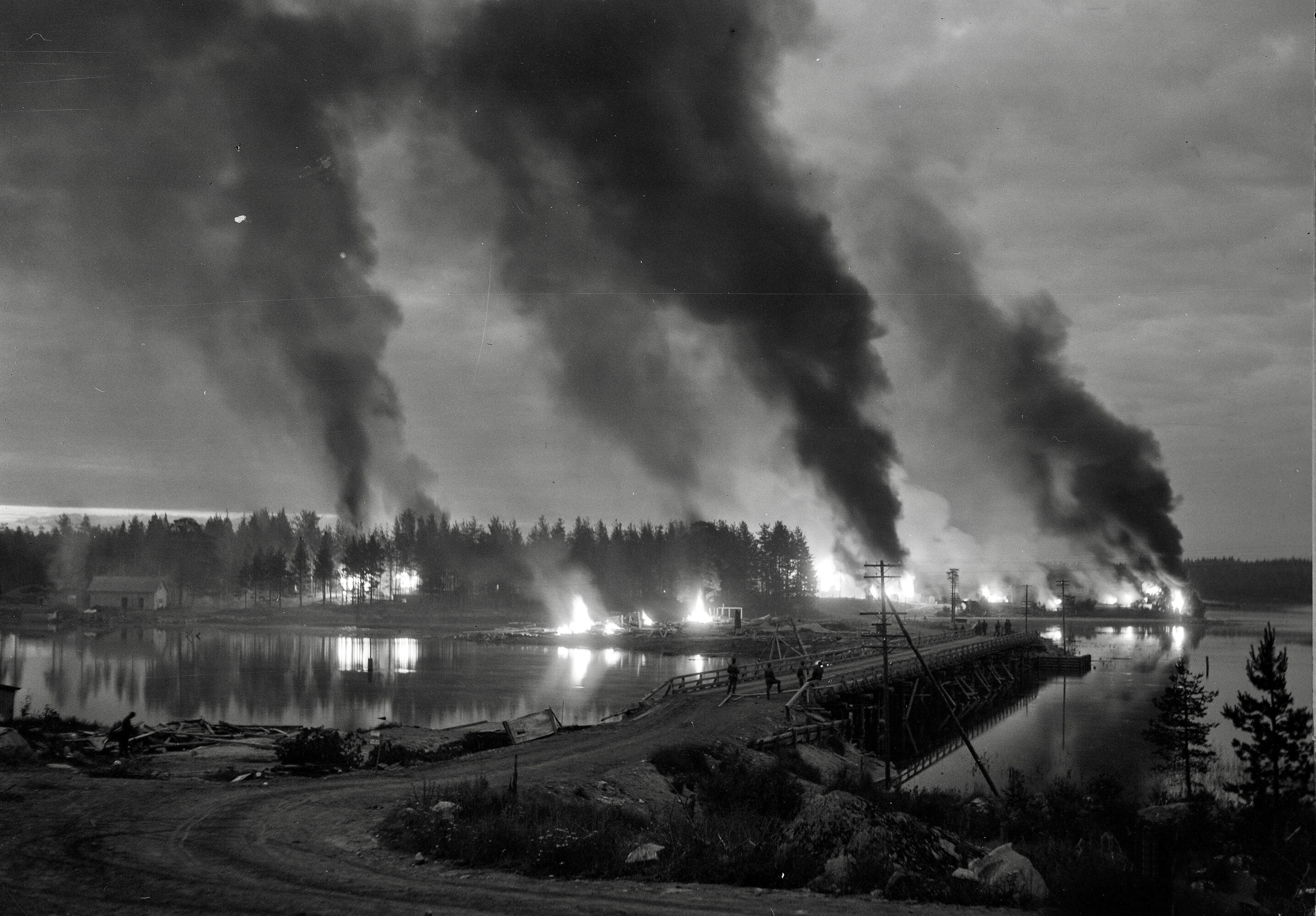 Vihollisen puoleisella rannalla olevia taloja poltetaan Porajärvellä, etteivät ne tarjoaisi mitään näkö- tai muuta suojaa viholliselle. Porajärvi 1944.07.10